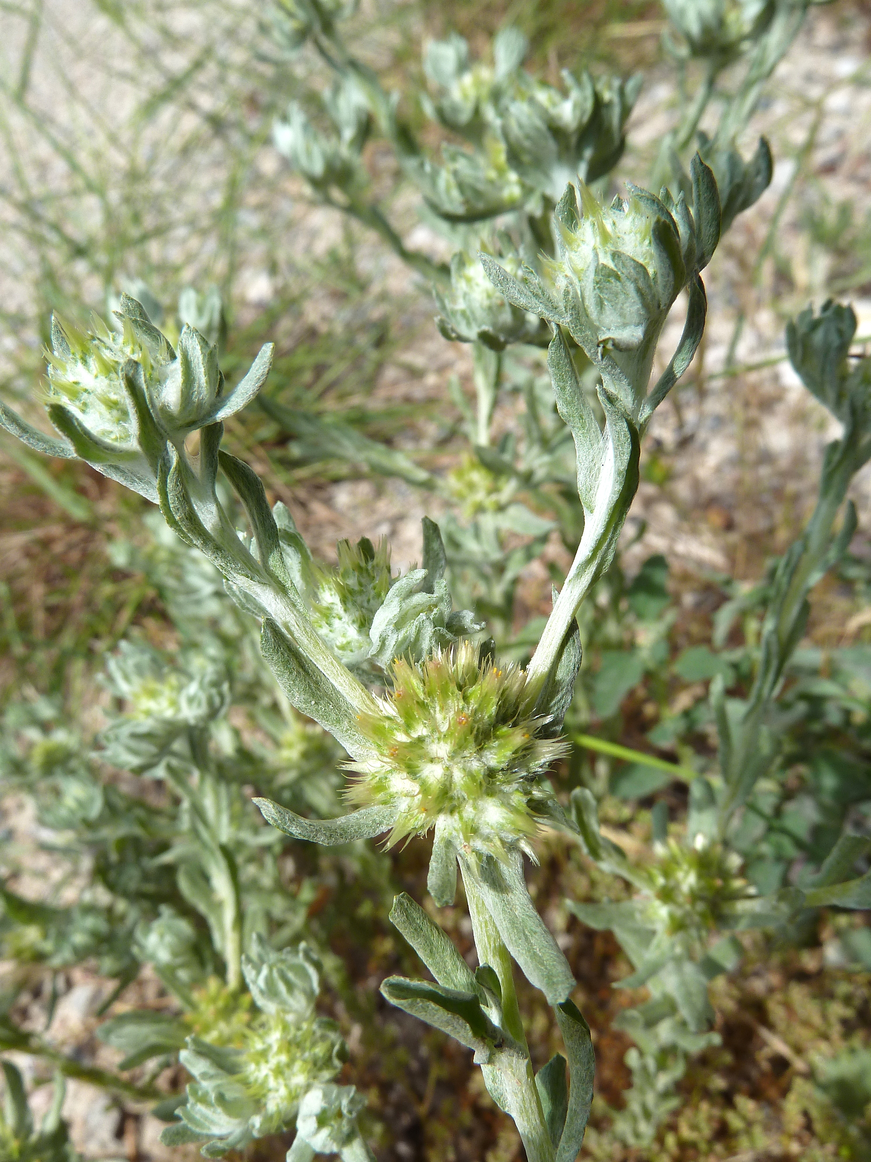 Filago pyramidata (hierba algodonera, padre e hijos) - Inflorescencias. - Camino de la Acequia de Cox, circa Cabezo de Pallarés, Albatera, Provincia de Alicante (España).